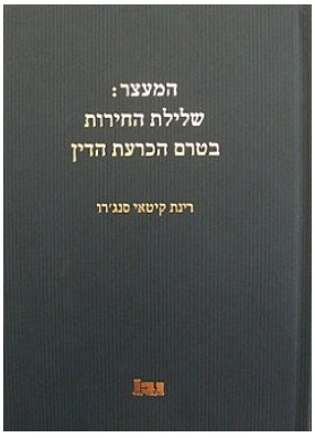 המעצר: שלילת החירות בטרם הכרעת הדין